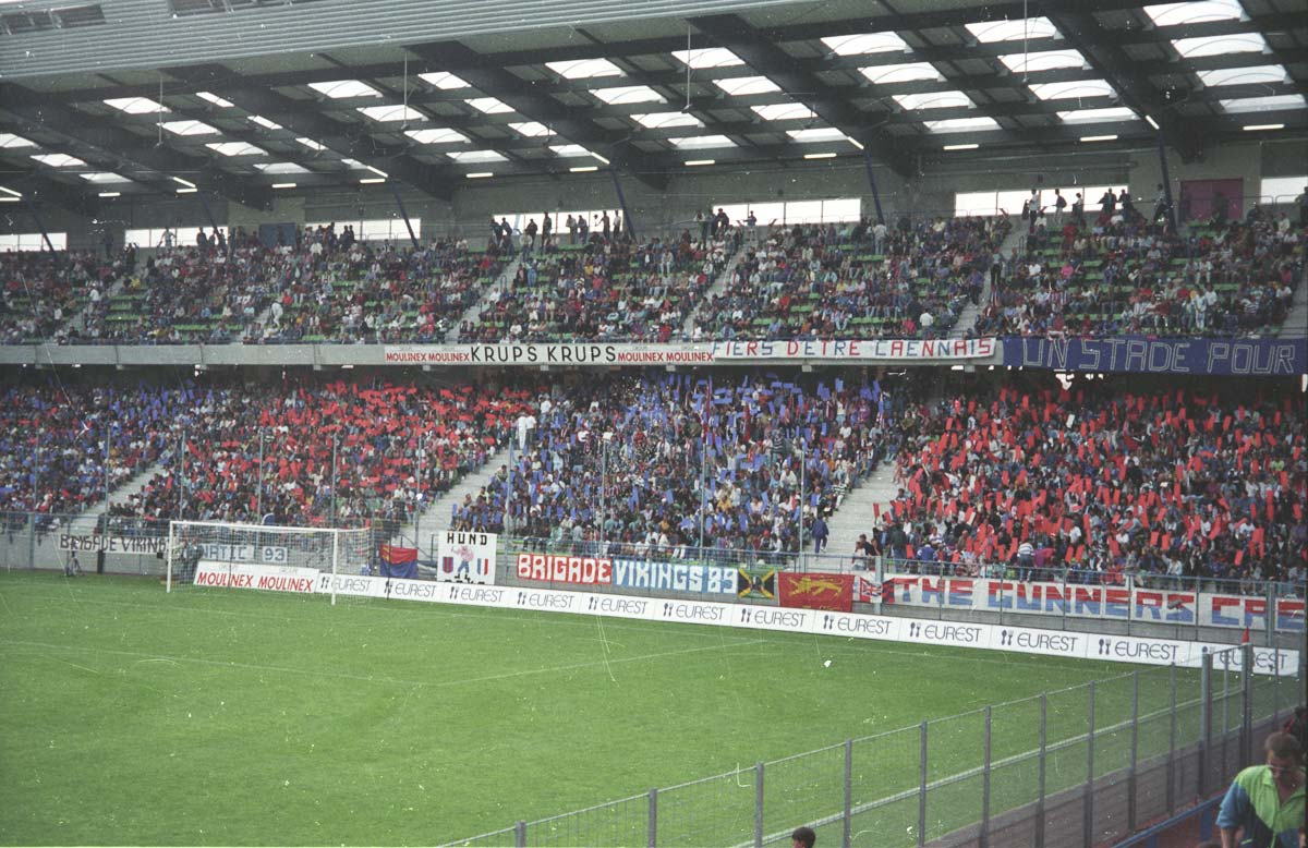 groupes caennais lors du premier match de championnat 93/94 contre Metz